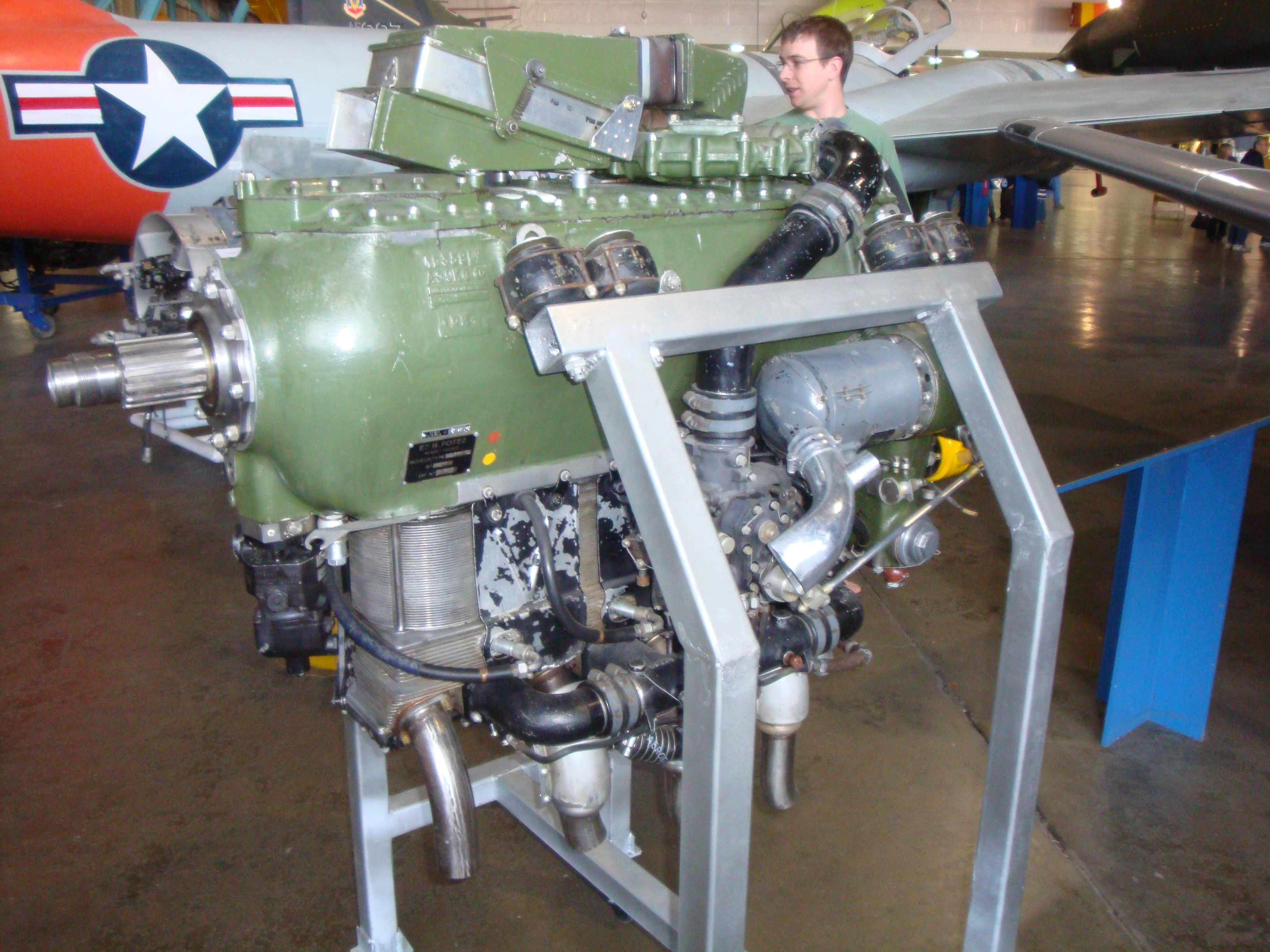 Potez 4D 4-cyl. inverted air-cooled piston engine from Société des Avions et Moteurs Henry Potez in France